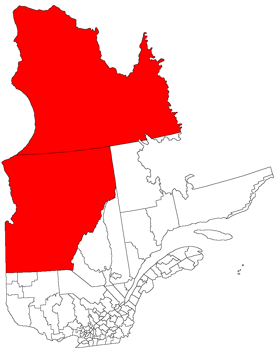 Nord-du-Québec region, Quebec